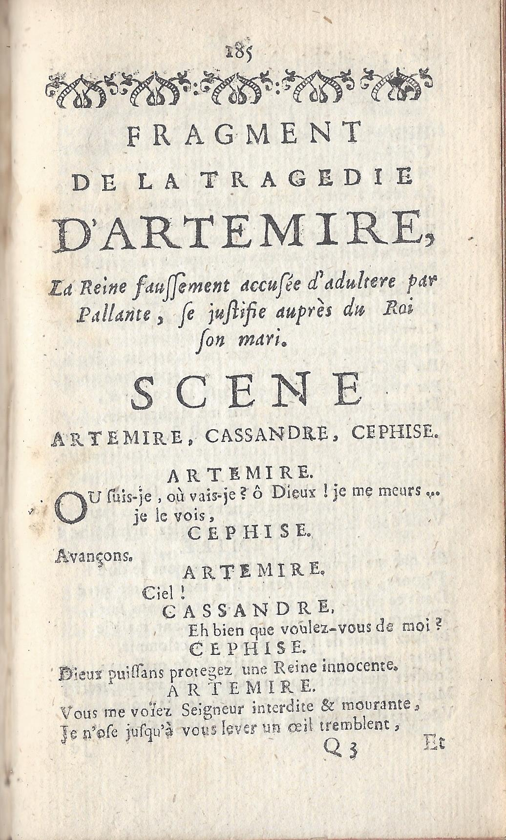 EWrstveröffentlichung eines Fragmentes des vierten Akrtes von Voltaires Artémire in der Ausgabe Bernard Amsterdam 1724.